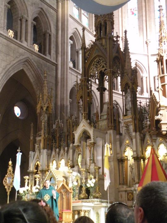 La misa de la basilica